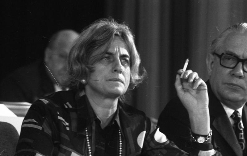 CDU-Parteitag 1972 in der Wiesbadener Rhein-Main-Halle (Dr. Helga Wex) 9.-11.10.1972